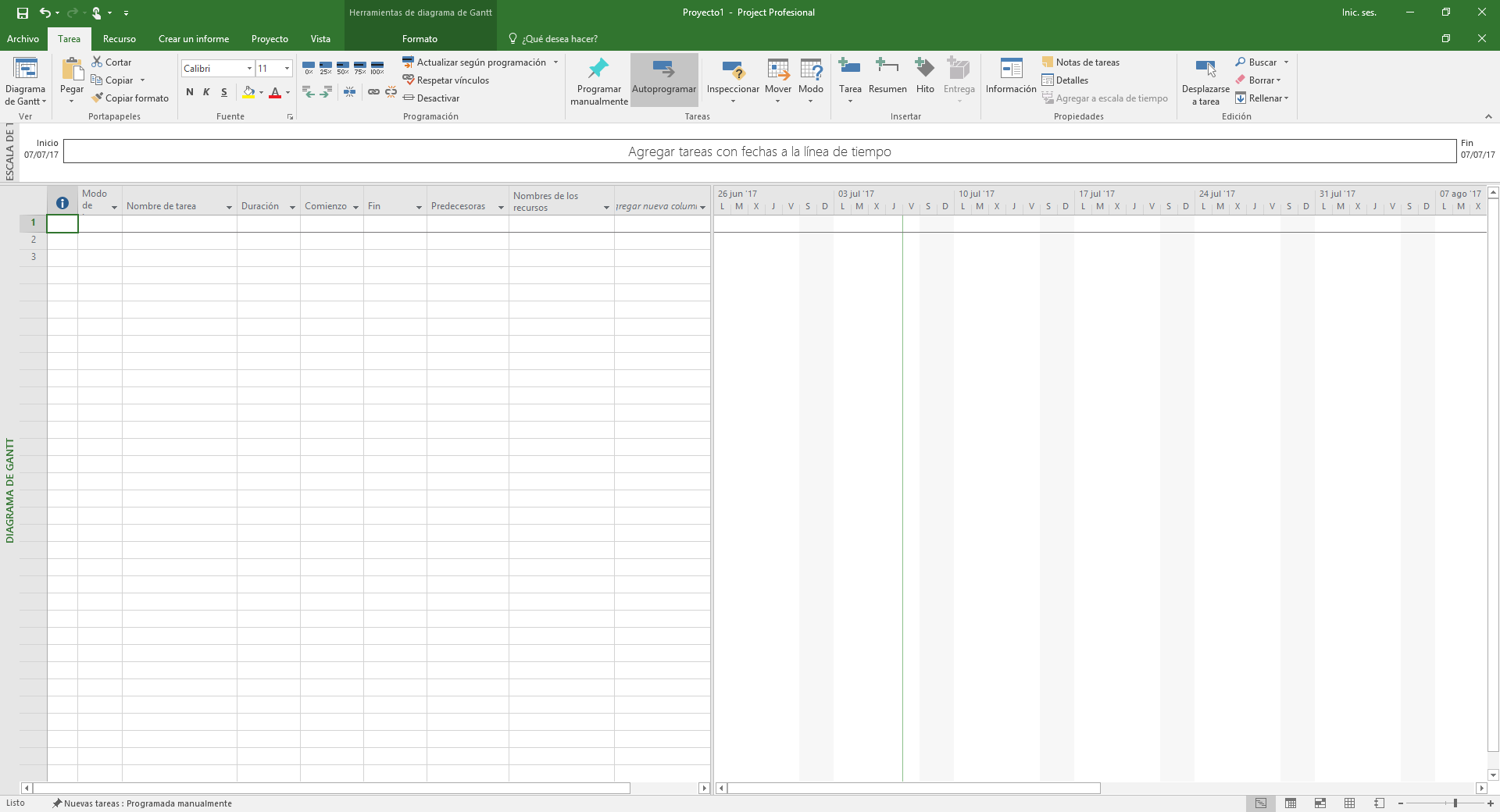 Vista Principal de la Interfaz de Ms Project Professional 2016 en español.